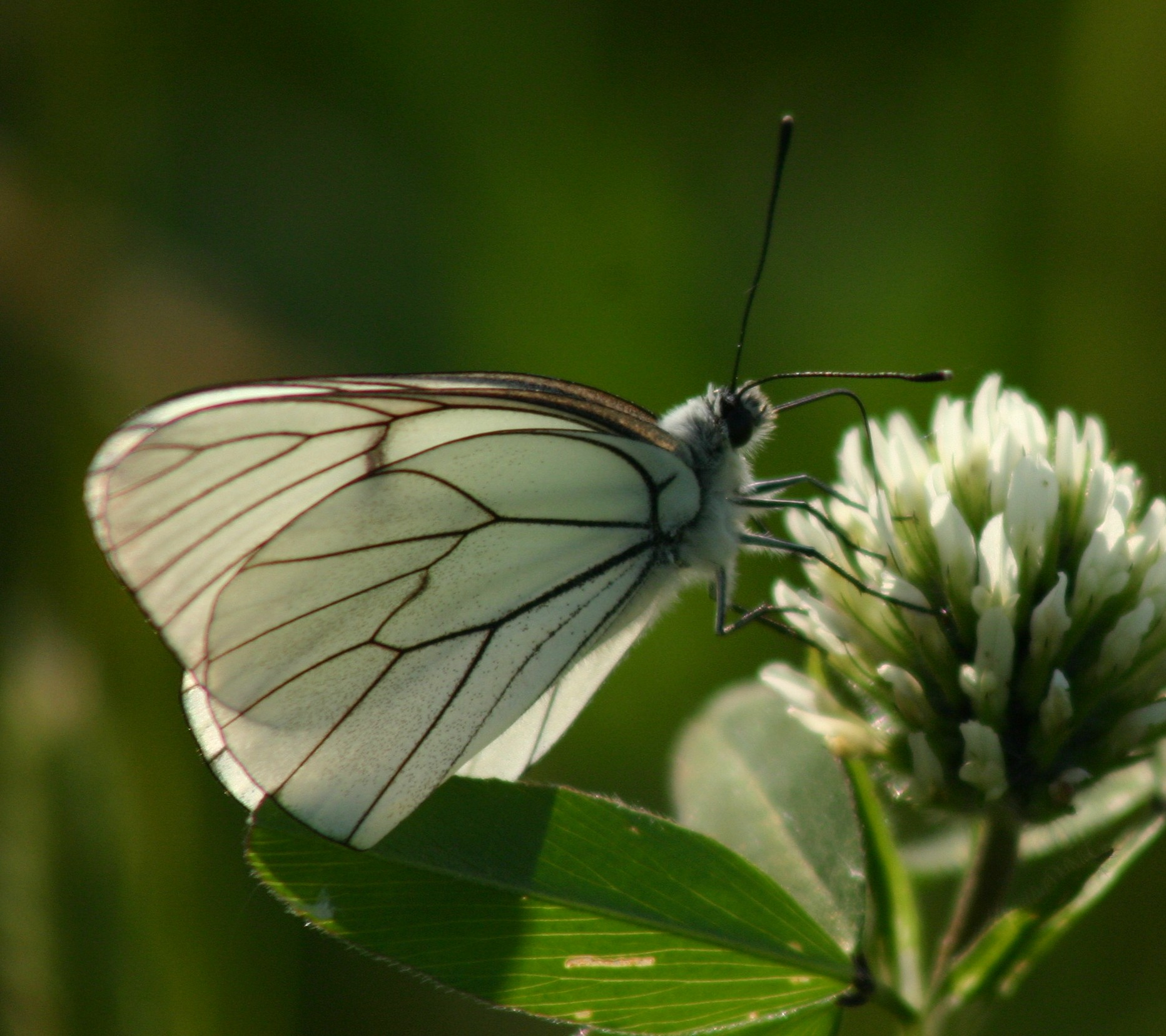 Baumweißling (Aporia crataegi), Toskana, Lucignano d'Asso (Bagnacci), 27.05.2005